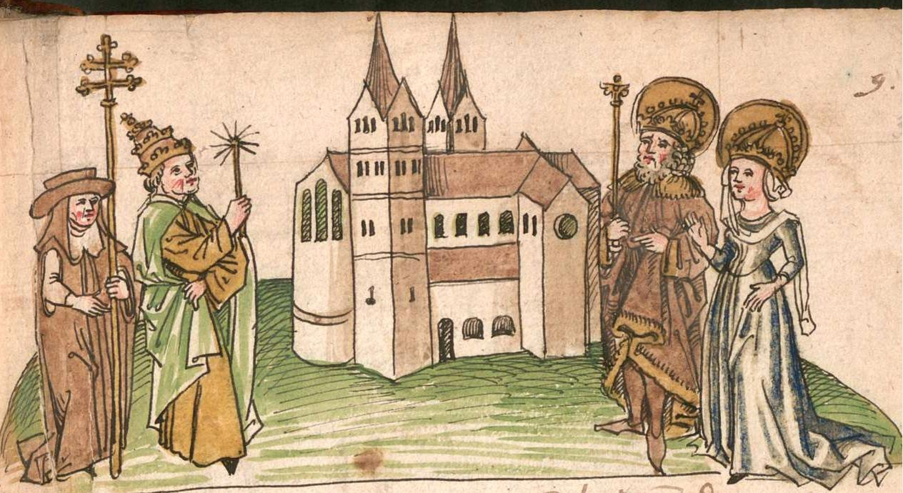 Kaiser Karl der Große stiftet mit seiner Königin Hildegard das Kemptener Kloster.